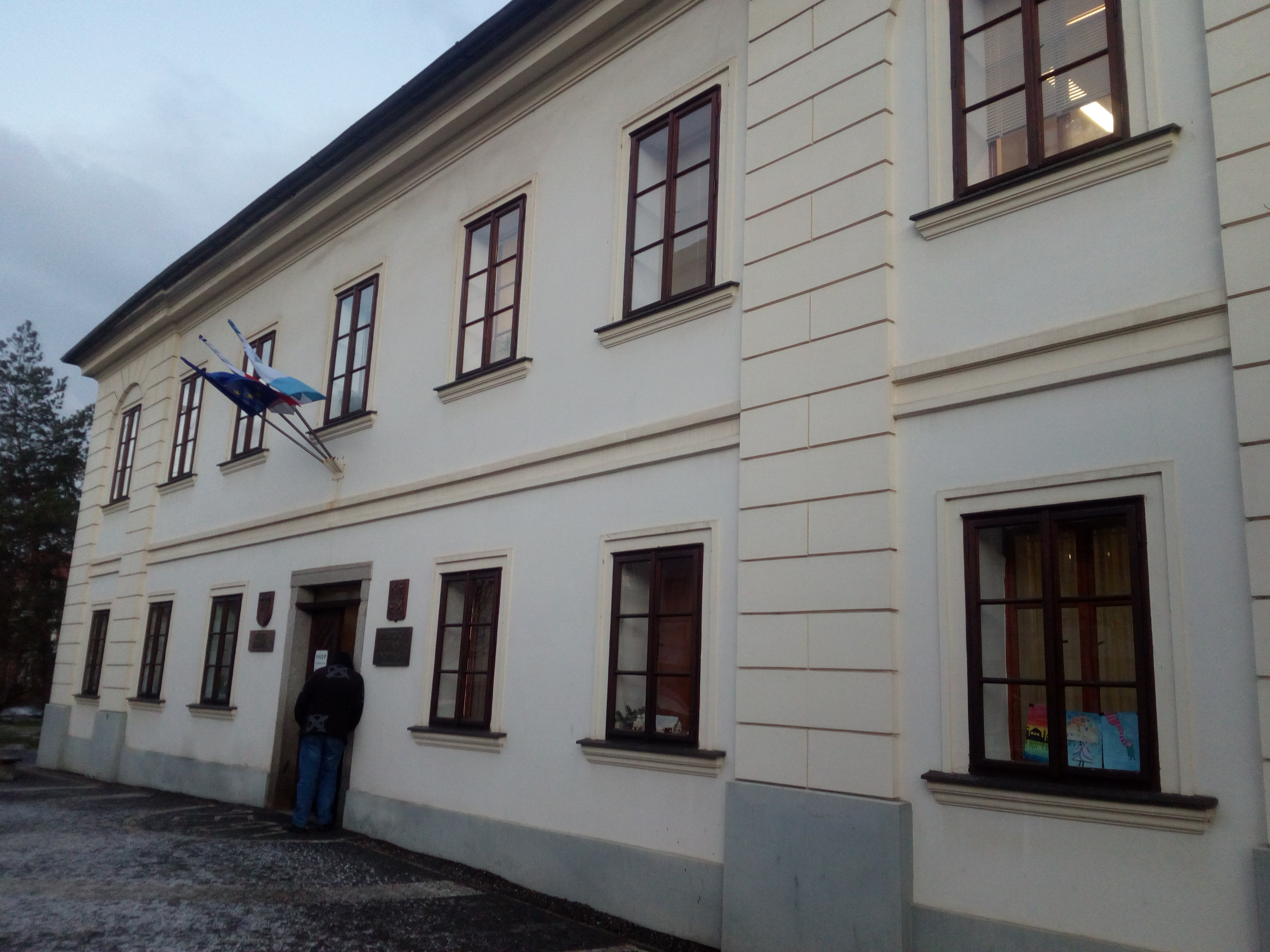 Snímek dobříšské radnice v pohledu od hotelu Heinz